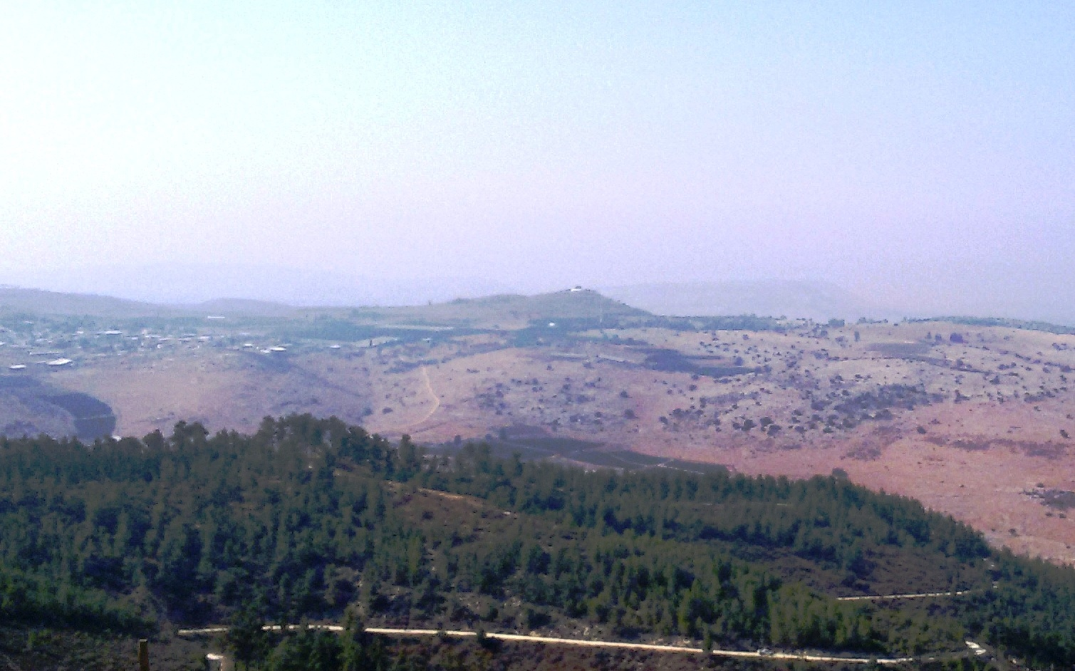 הר אביתר; מבט ממצודת ביריה